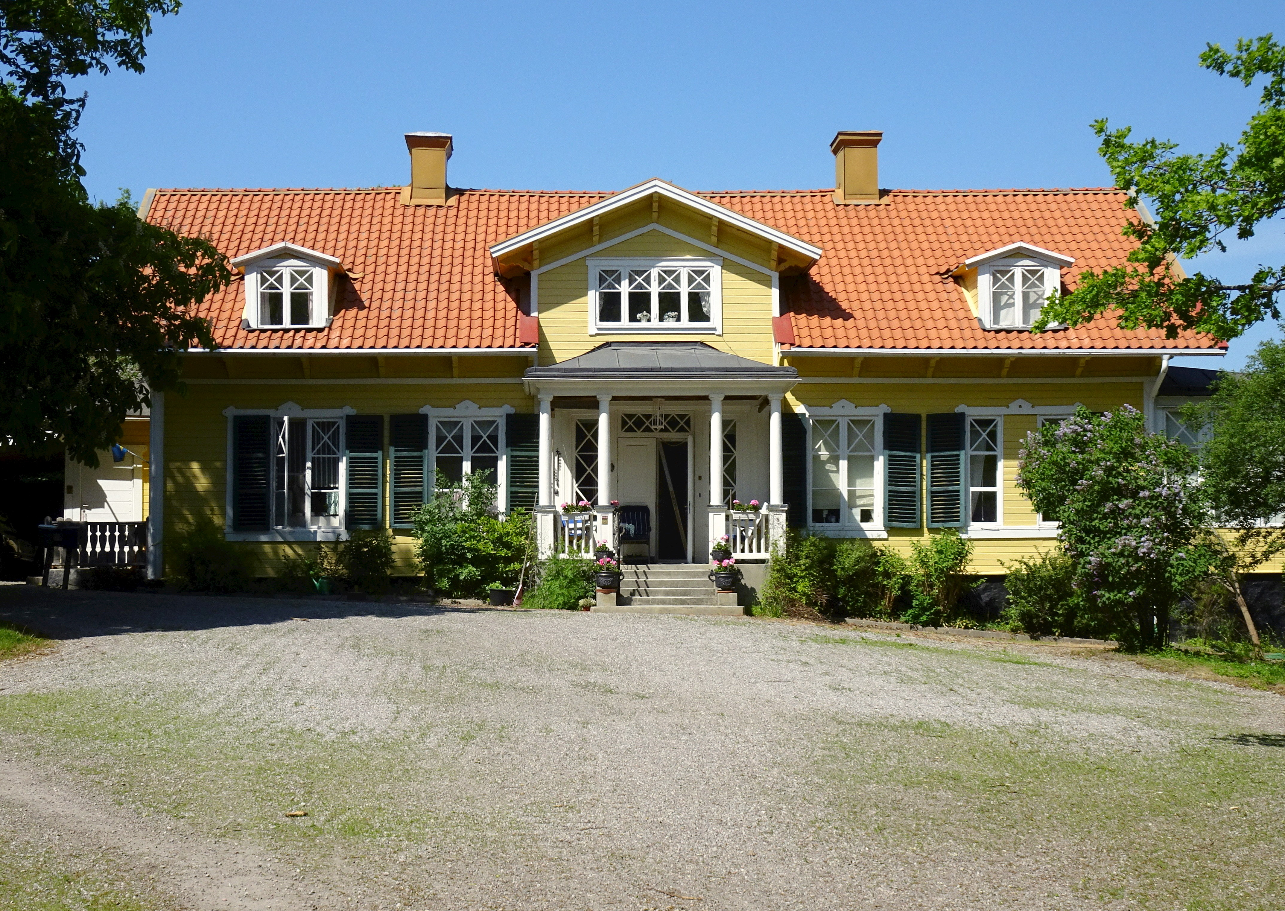 Edeby gård, Lovön